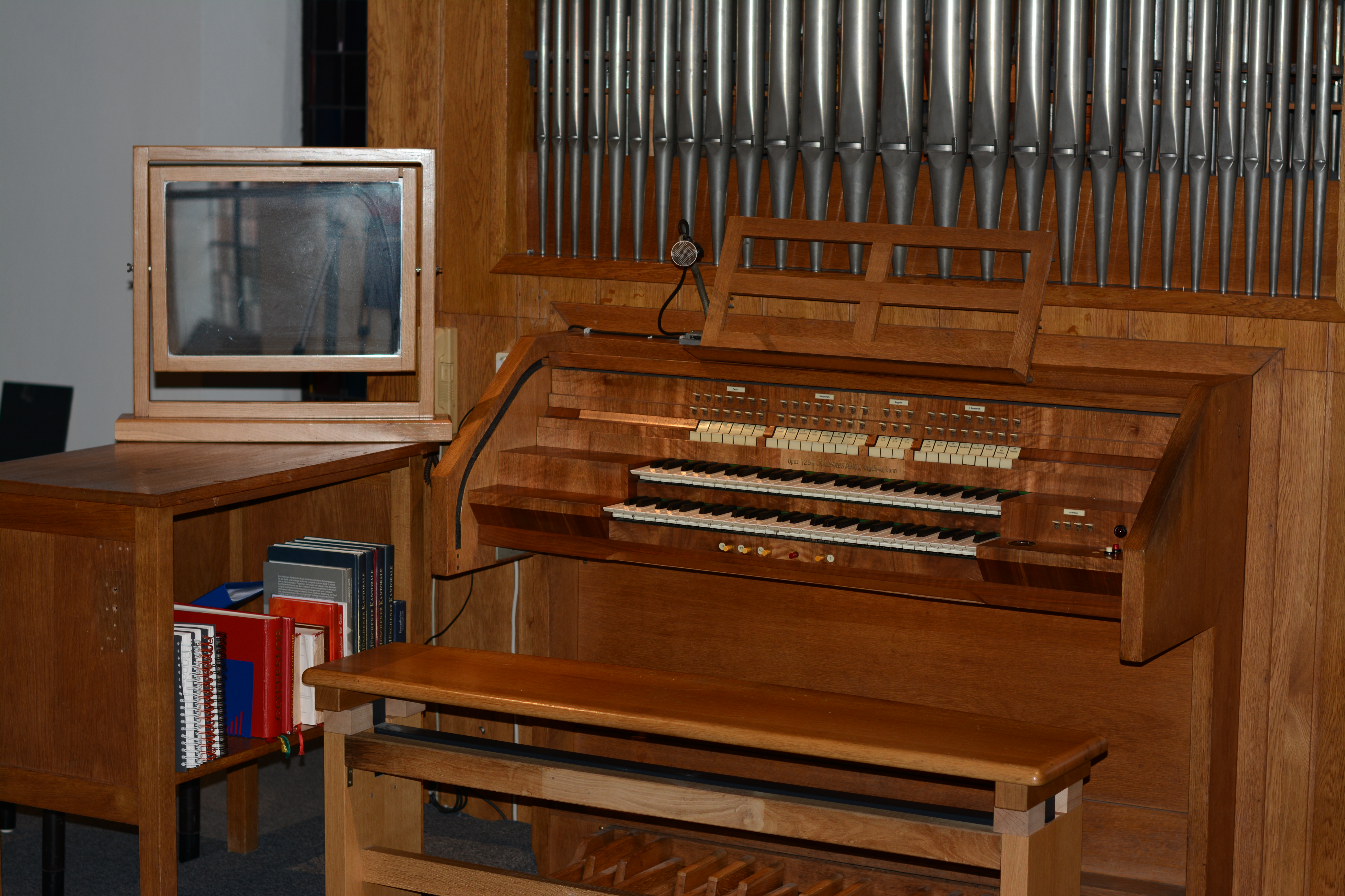 Der Spieltisch der Klais-Orgel (II/P 21, Op. 1259) in Maria Königin (Lingen)